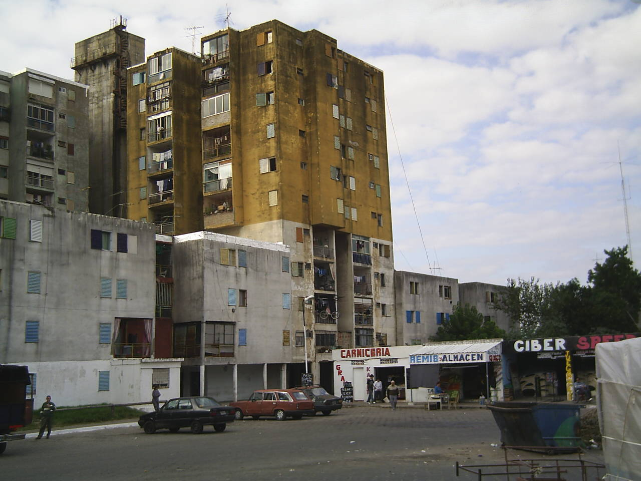 Foto de viviendas sociales en el barrio de Fuerte Apache. Ciudadela, Provincia de Buenos Aires.